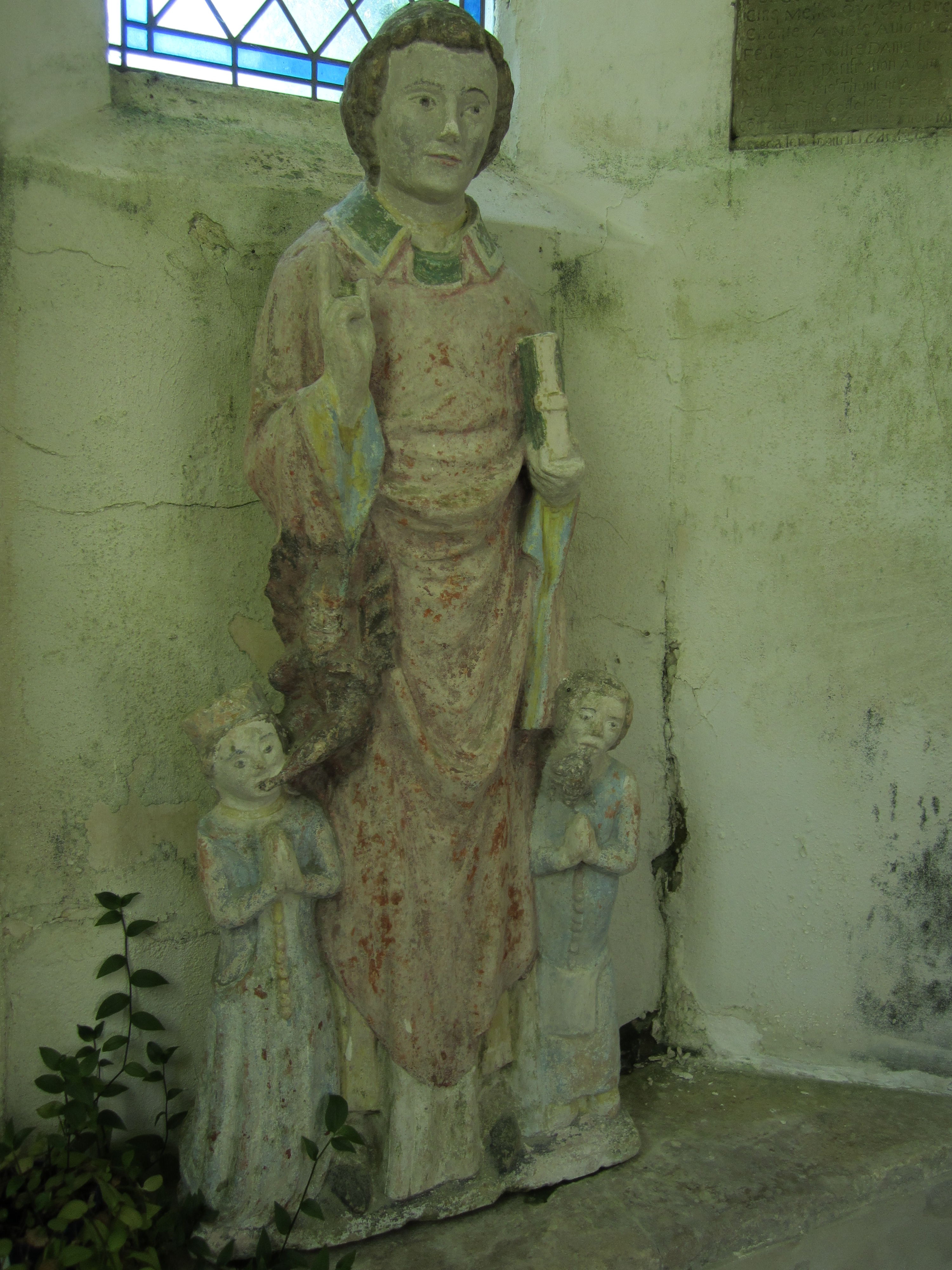 Église Saint-Pierre de Biniville